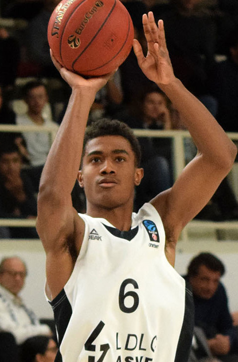 Theo Maledon - Villerubanne (Eurocup: Dolomiti Energia Trento vs ASVEL Villerubanne)